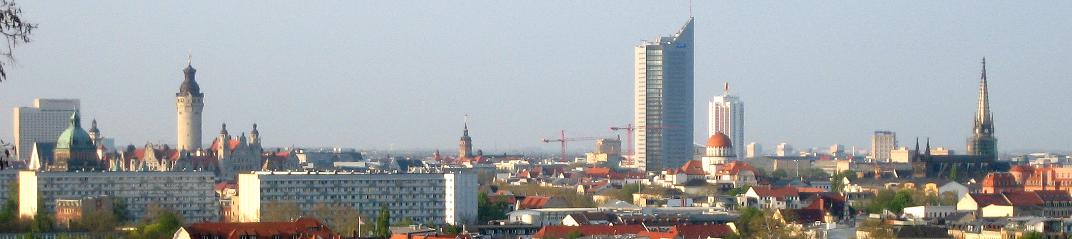 Panorama der Leipziger Innenstadt vom Fockeberg aus gesehen